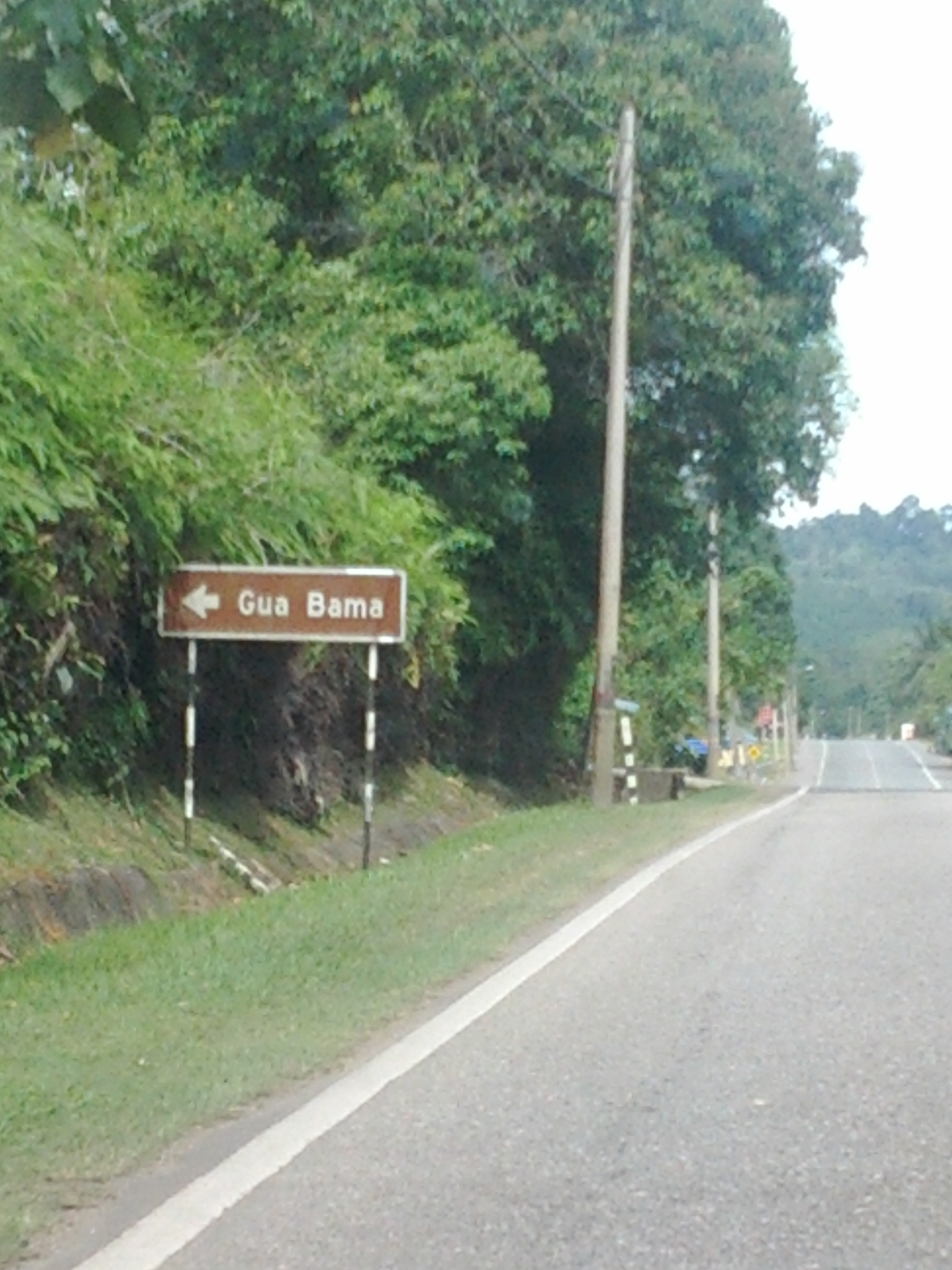 Papan tanda ke Gua Bama, Pahang.